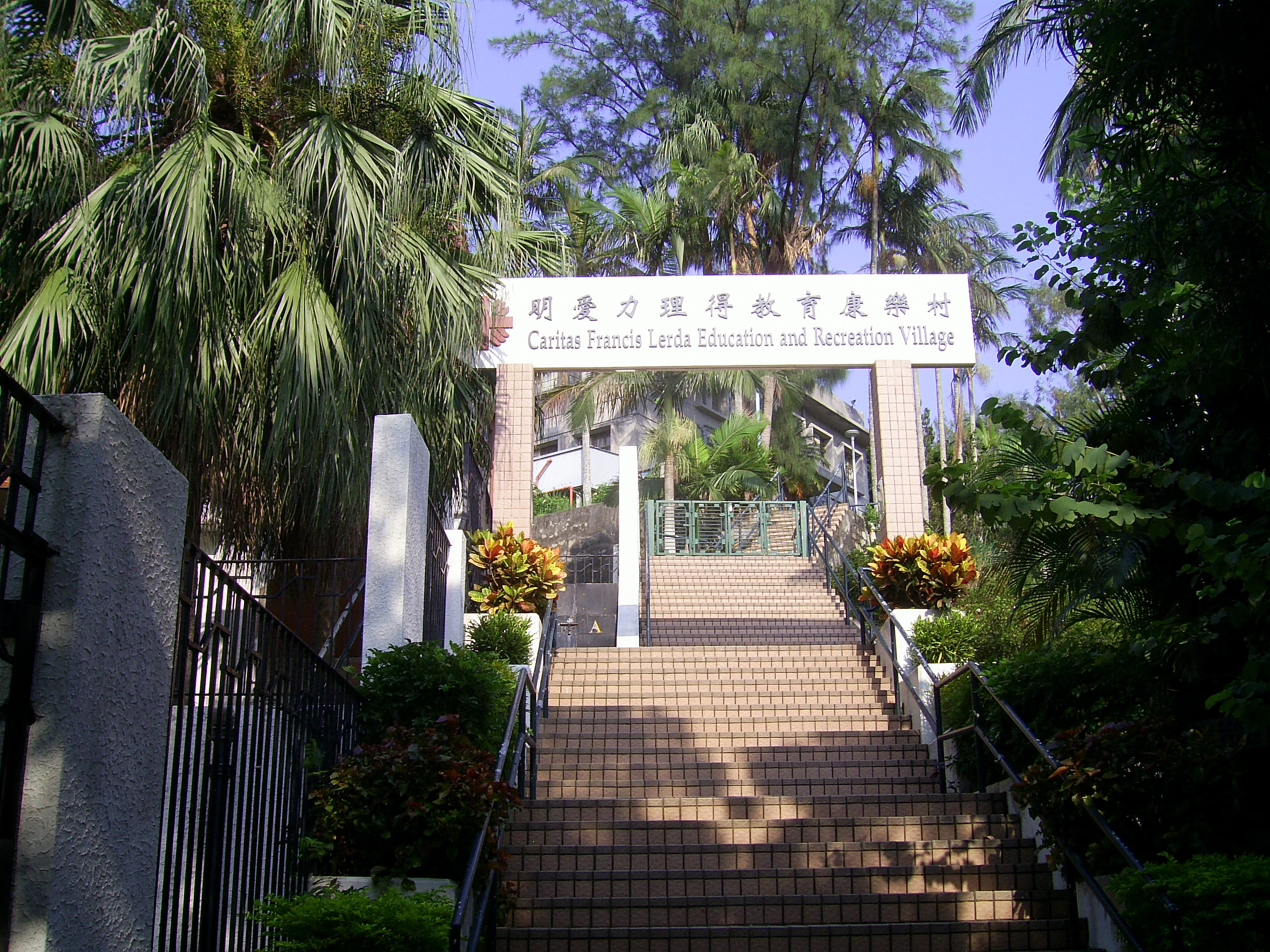 中文（香港）: 明愛力理得教育康樂村